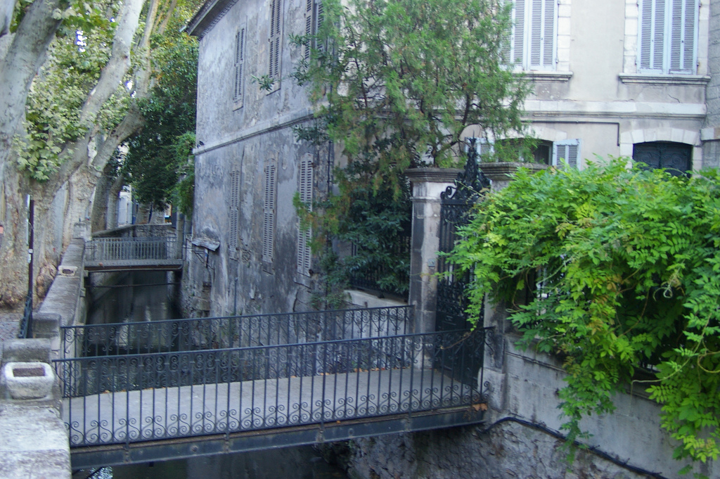 Rue des Teinturiers accès aux maisons par des passerelles